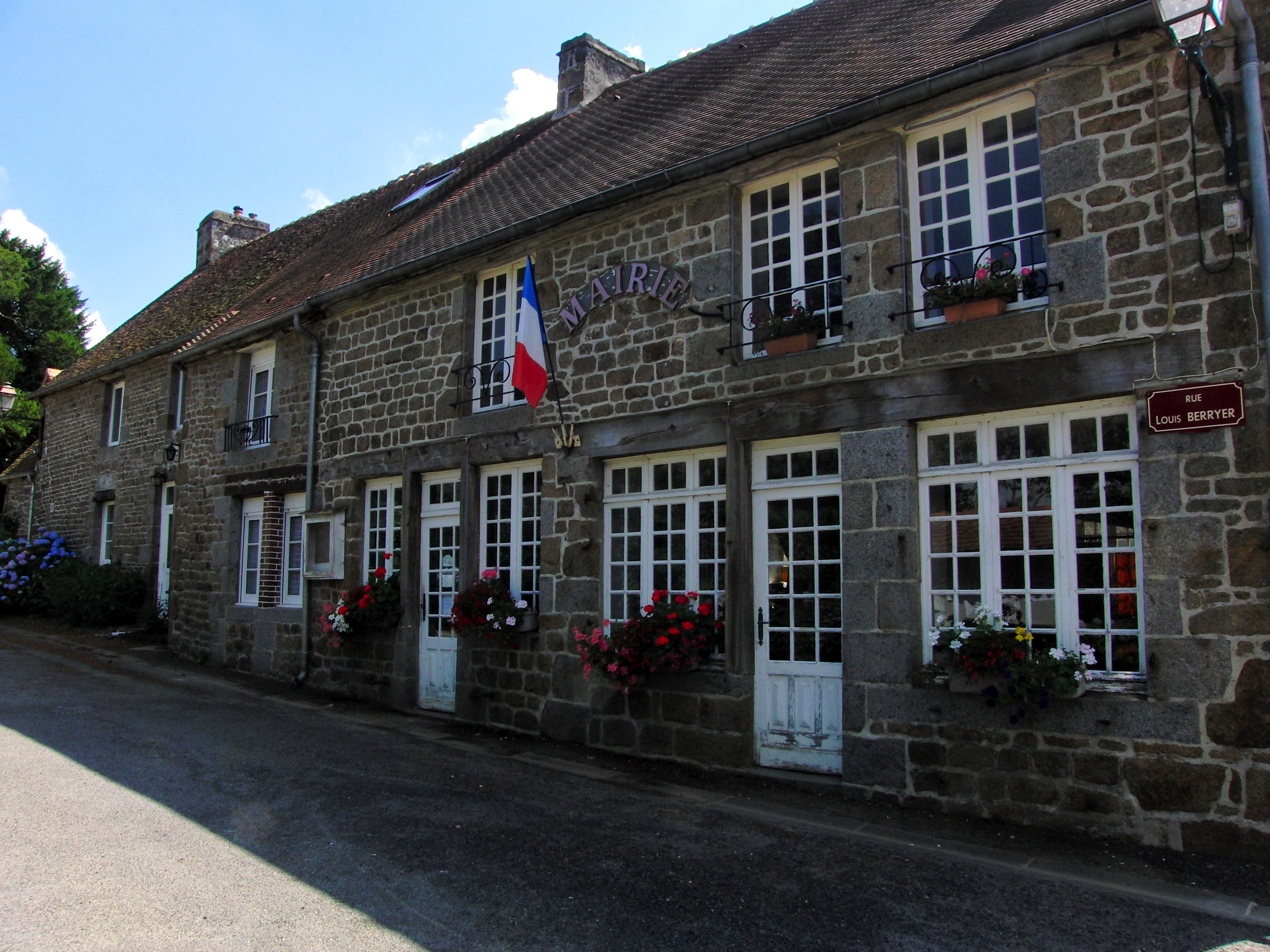 Mairie de Dompierre, Orne, France